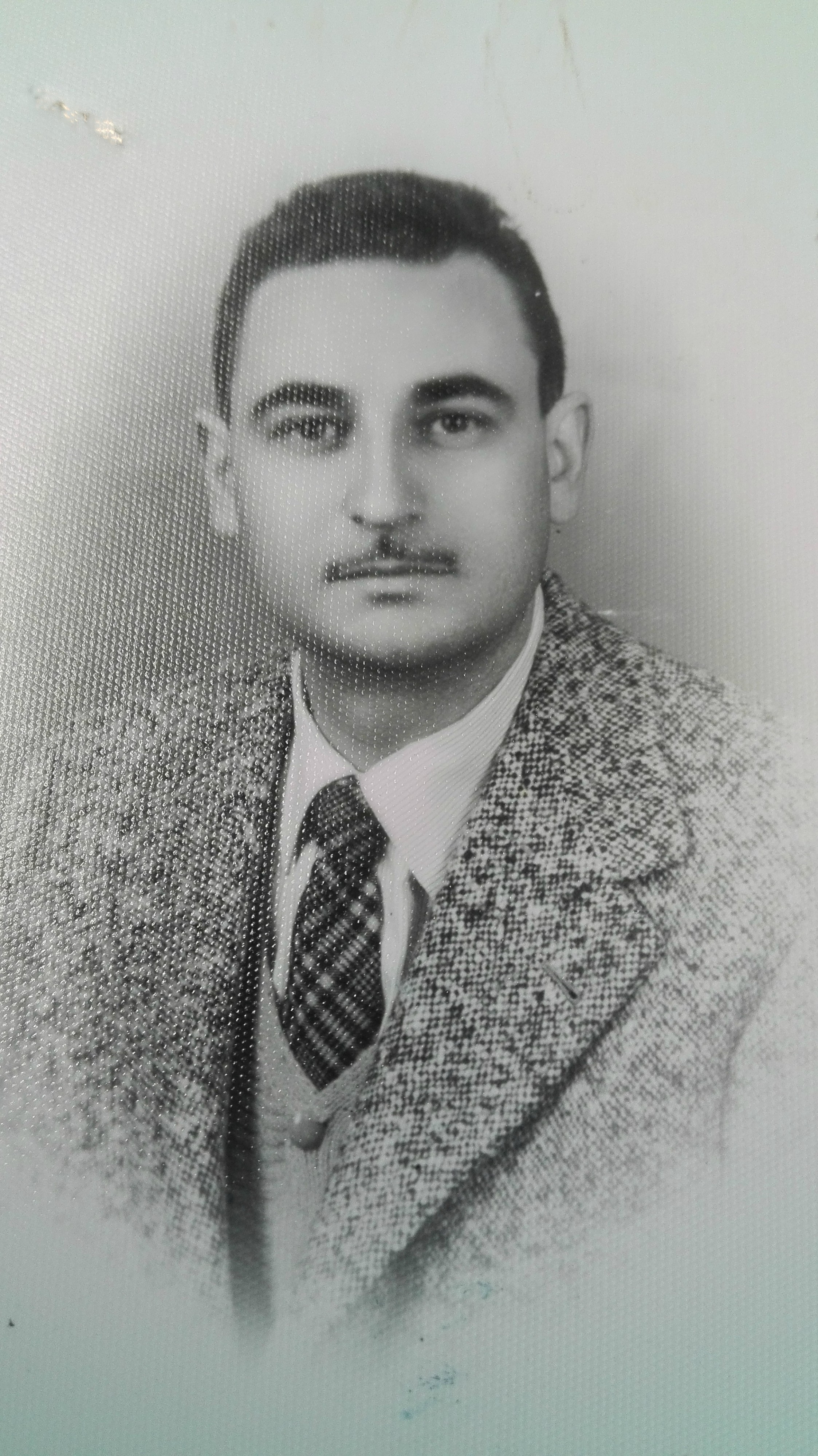 Ritratto fotografico di Gioacchino Paparelli